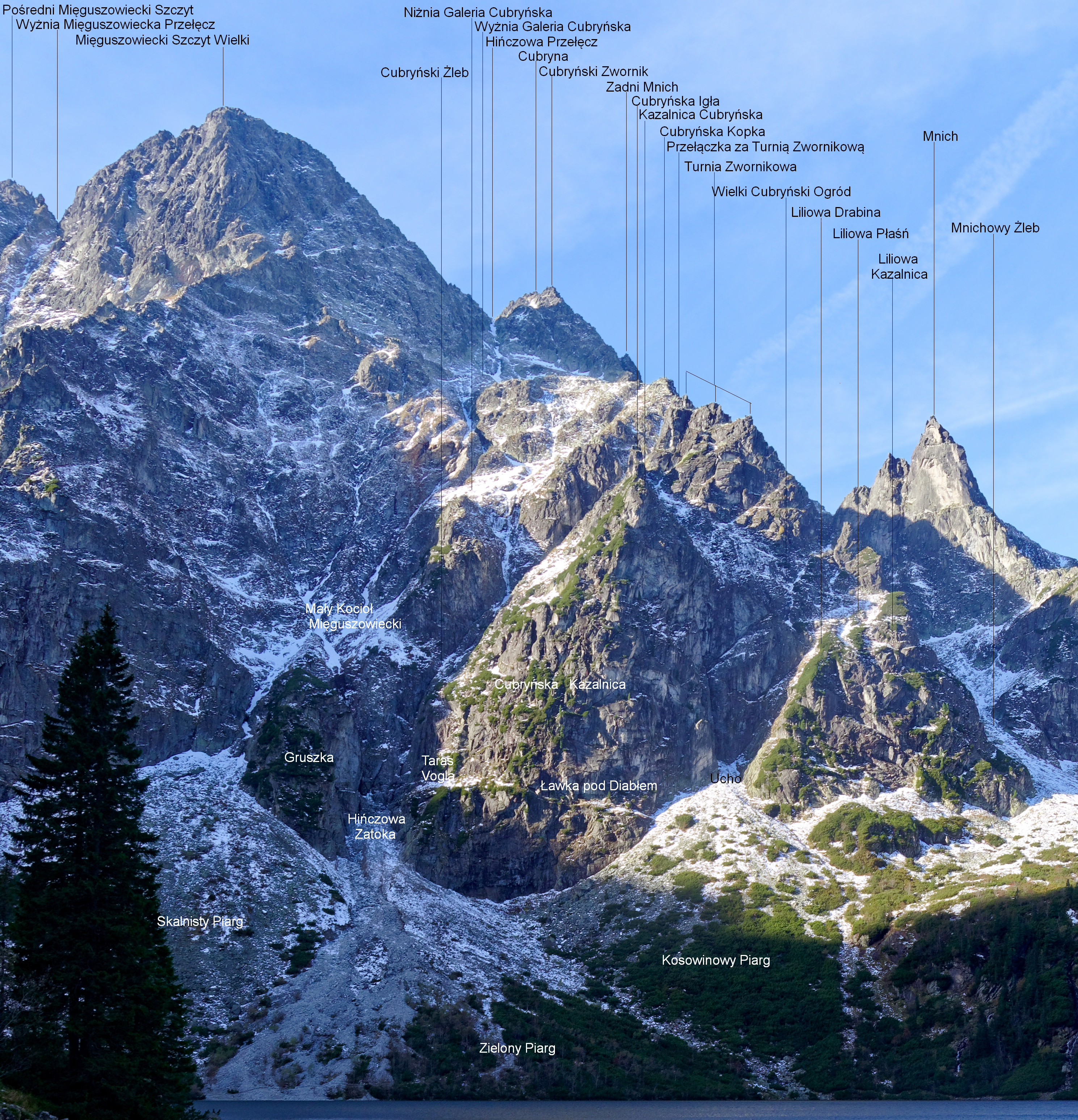 Szczyt Mięguszowiecki i Cubryna